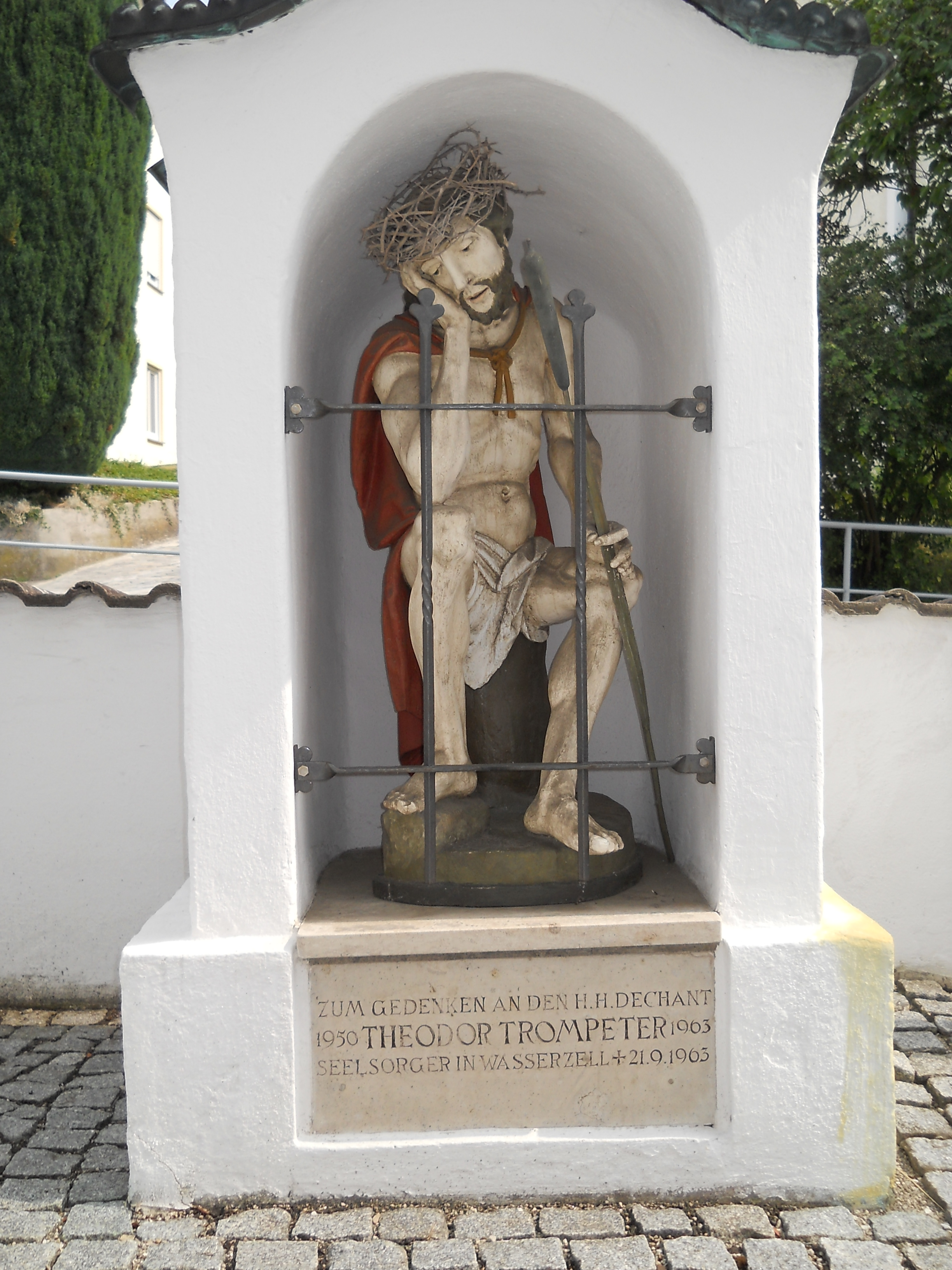 Wasserzell bei Eichstätt in Oberbayern, Kapelle mit Figur "Christus in der Rast" im Friedhof an der Kirche